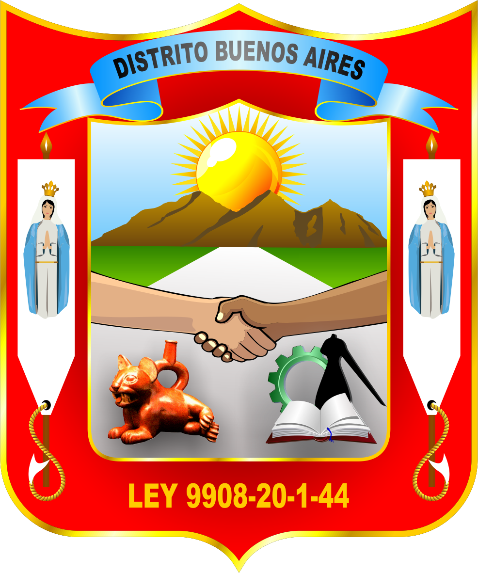 ESCUDO DE BUENOS AIRES La Historia de nuestro Escudo y Emblema Bonaerense fue mediante concurso en el año 1993, donde fuera alcalde en esa época el señor Percy Chevez Navarro. Por su parte el Instituto Nacional de Cultura (INC), con RESOLUCIÓN DIRECTORIAL ° 003-93/DRC.INC.RC. Resuelve, Oficializar el ESCUDO Y EMBLEMA del Distrito de Buenos Aires, cuyos Autores son los señores: RAÚL ANTONIO LOZADA GIRON PRAXEDES HERNAN NEYRA CAMISAN El mismo que será exhibido y perennizado en todos los actos públicos que disponga la Municipalidad, cada uno de sus elementos tiene un gran significado que a continuación detallo: El sol: astro imperial de oro topacio, dios de nuestros antepasados que irradia nuestro pueblo dando energía. El cerro: a 5 km. de buenos aires, exactamente cerca al caserío de rio seco se encuentra tan majestuosos y guardia cerro de tinajones, de forma piramidal, su leyenda nos dice que es un cerro encantado ya que en dicho lugar se encuentran tinajas, barriles de oro y todo aquel que llega hasta dicho lugar queda encantado. Las manos entrelazadas: este gesto nos demuestra la pureza, fe, integridad, firmeza, fortaleza como pueblo y lo unidos que somos para salir adelante. Cerámica: artesanía de la cultura Vicus, ubicada dentro de nuestra provincia de Morropón Chulucanas a unos 45 km de nuestro distrito. Símbolos científicos: son abreviaciones o signos que se utilizan para identificar los elementos y compuestos químicos. La fecha: significa el año en que nuestro distrito de buenos aires es elevado a la categoría de distrito por la r.s. del 20 de enero de 1944. Fondo rojo y blanco: colores que identifican los colores de nuestra bandera nacional significa el patriotismo la potencia y la identidad con nuestra amada patria. La virgen: ubicada en los extremos de nuestro escudo que simboliza la religiosidad en nuestro pueblo.